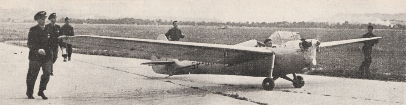 Motoszybowiec Bąk na lotnisku w Rzymie, 1939 r. Międzynarodowy Zlot Prasowy. Pilot Tadeusz Derengowski